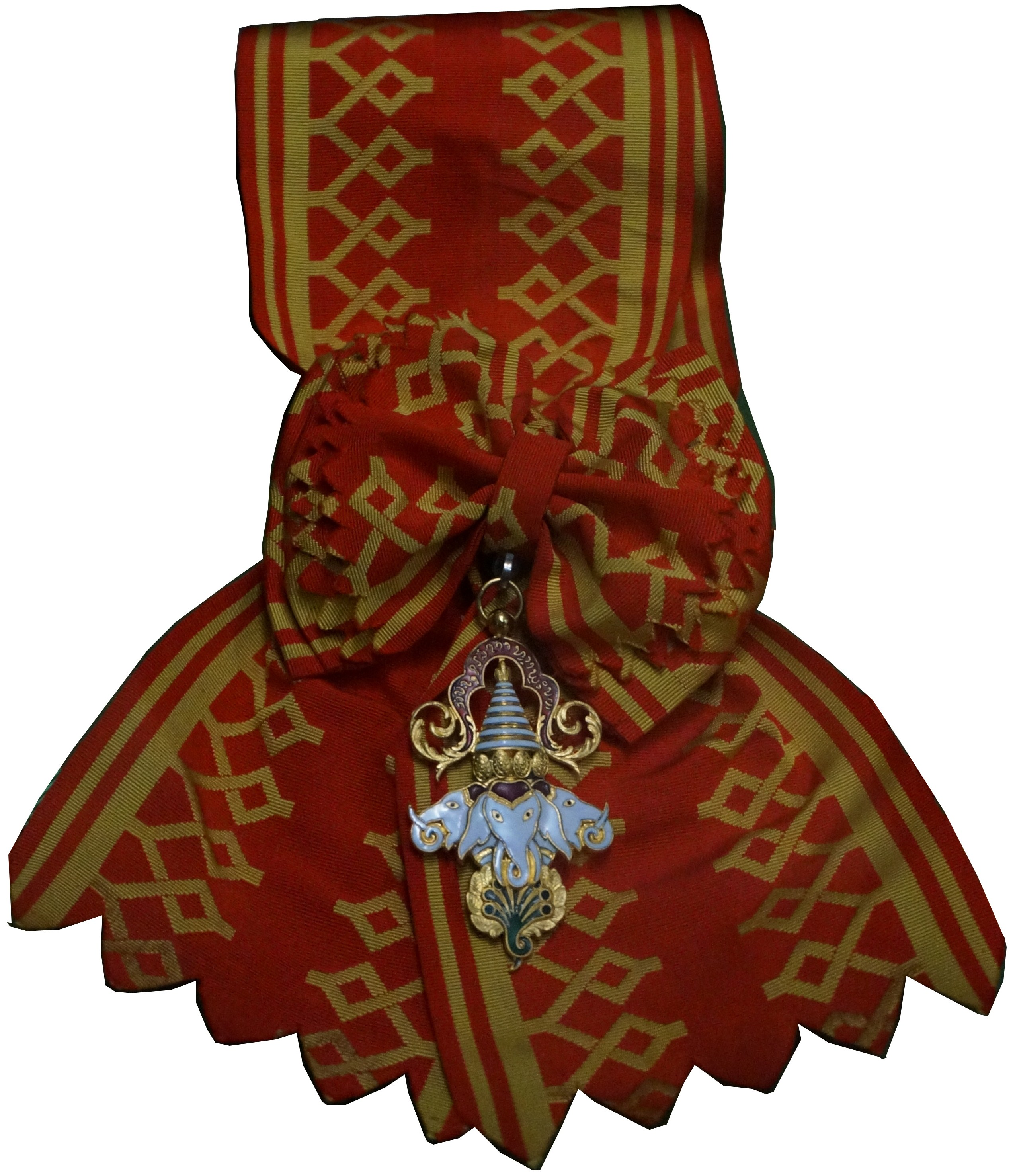 Présenté lors de l'exposition Indochine des territoires et des hommes 1856 1956 .